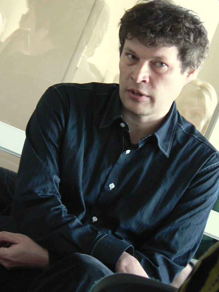 Kirjanik ja ajakirjanik Andrei Hvostov Tartu Oskar Lutsu raamatukogus kohtumisel lugejatega.